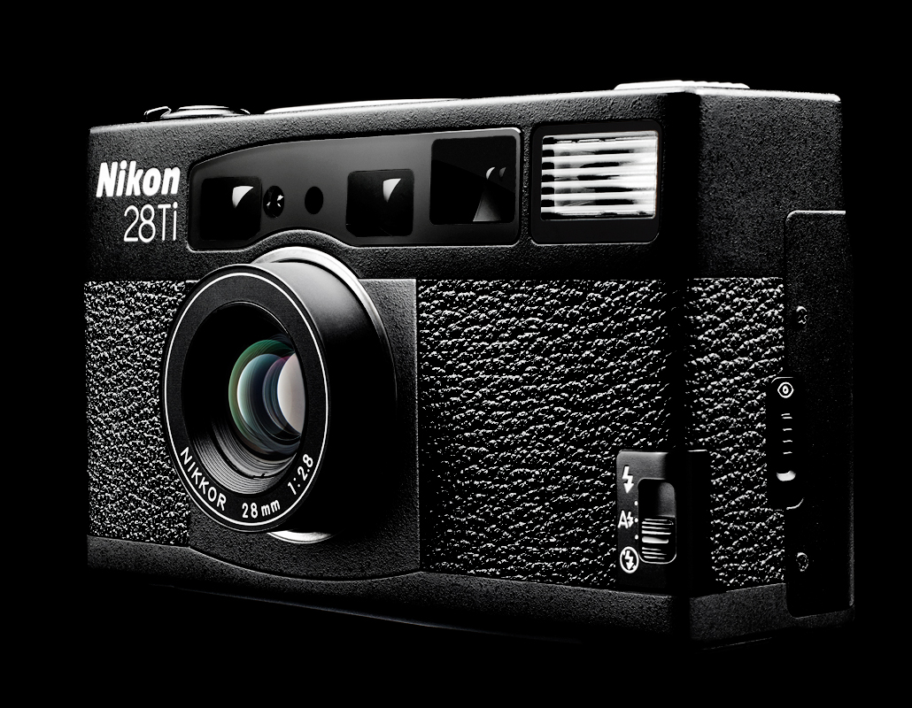 Nikon 28ti Camera